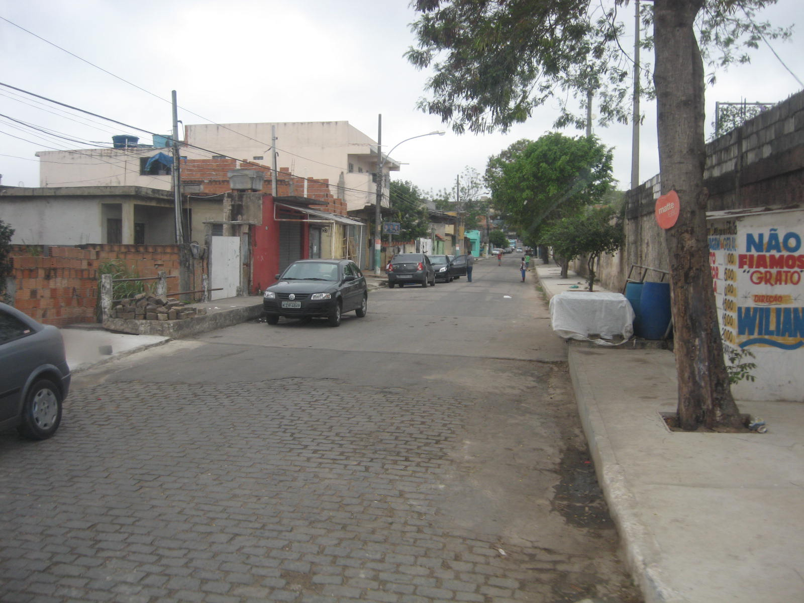 Vista do bairro Vila Norma, em São João de Meriti.